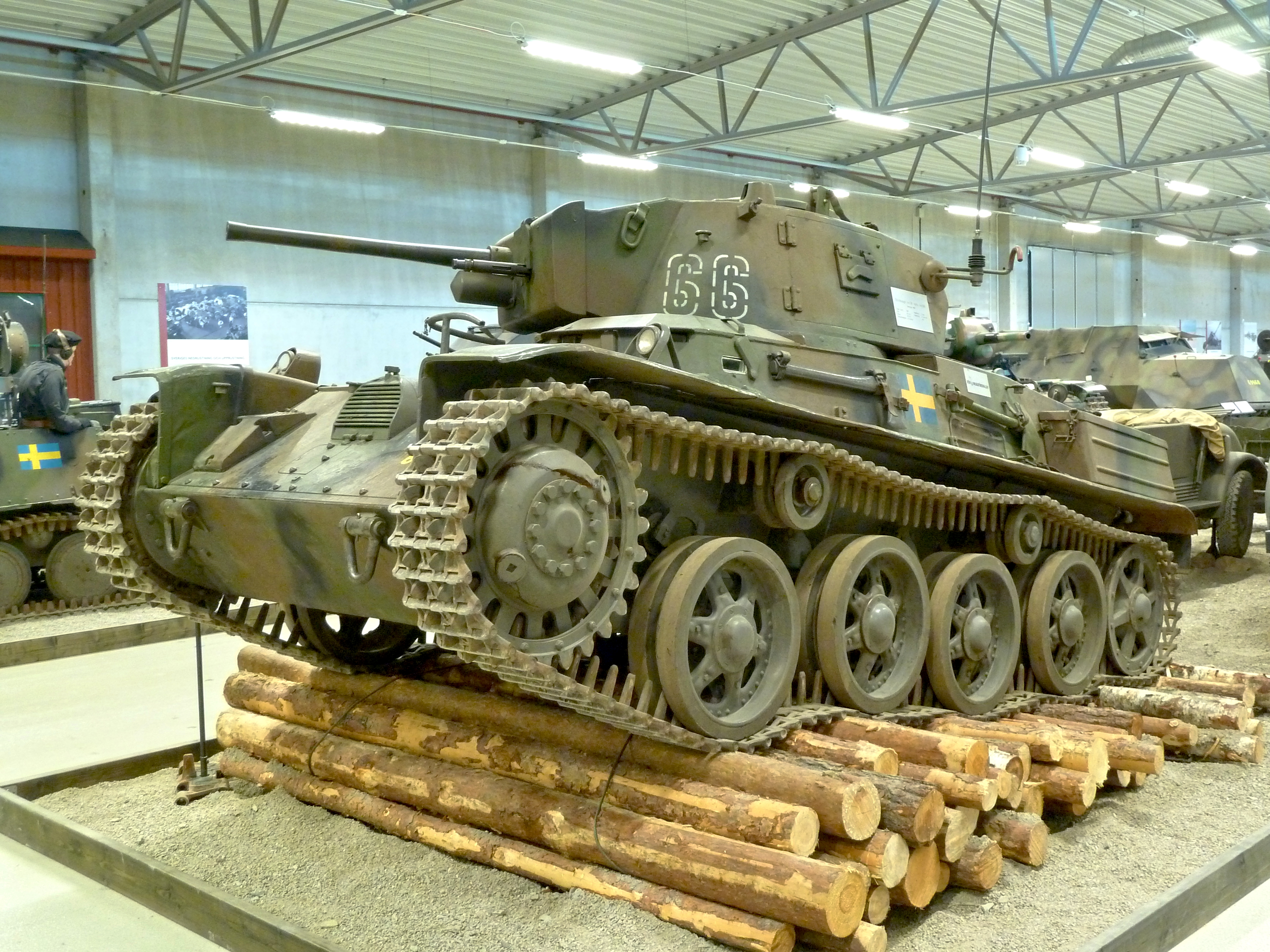 Stridsvagn m/38 i Arsenalen Strängnäs 12.08.2011